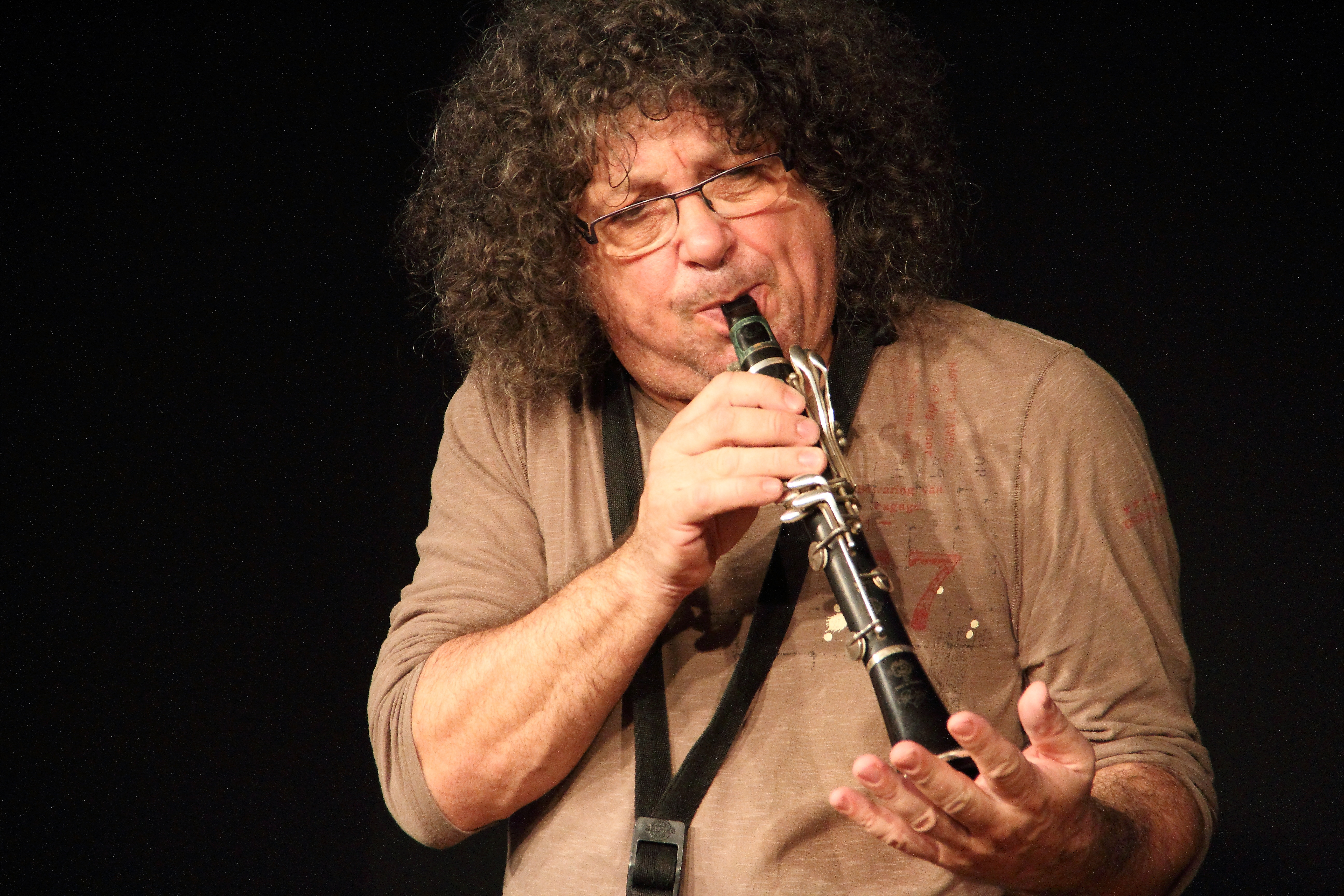 Das East-West Trio im KULT Niederstetten. Das frei improvisierende Trio besteht aus Xu Fengxia (guzheng, sanxian, voc), Didier Petit (cello) & Sylvain Kassap (cl).